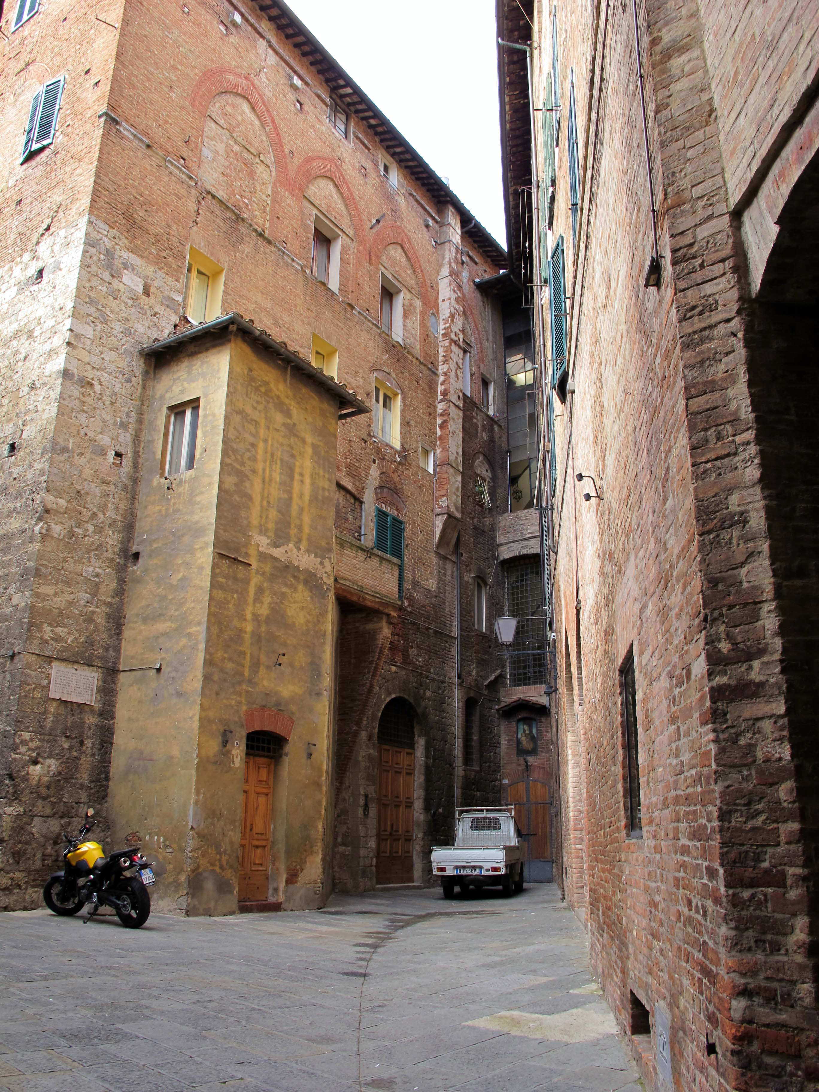 Siena